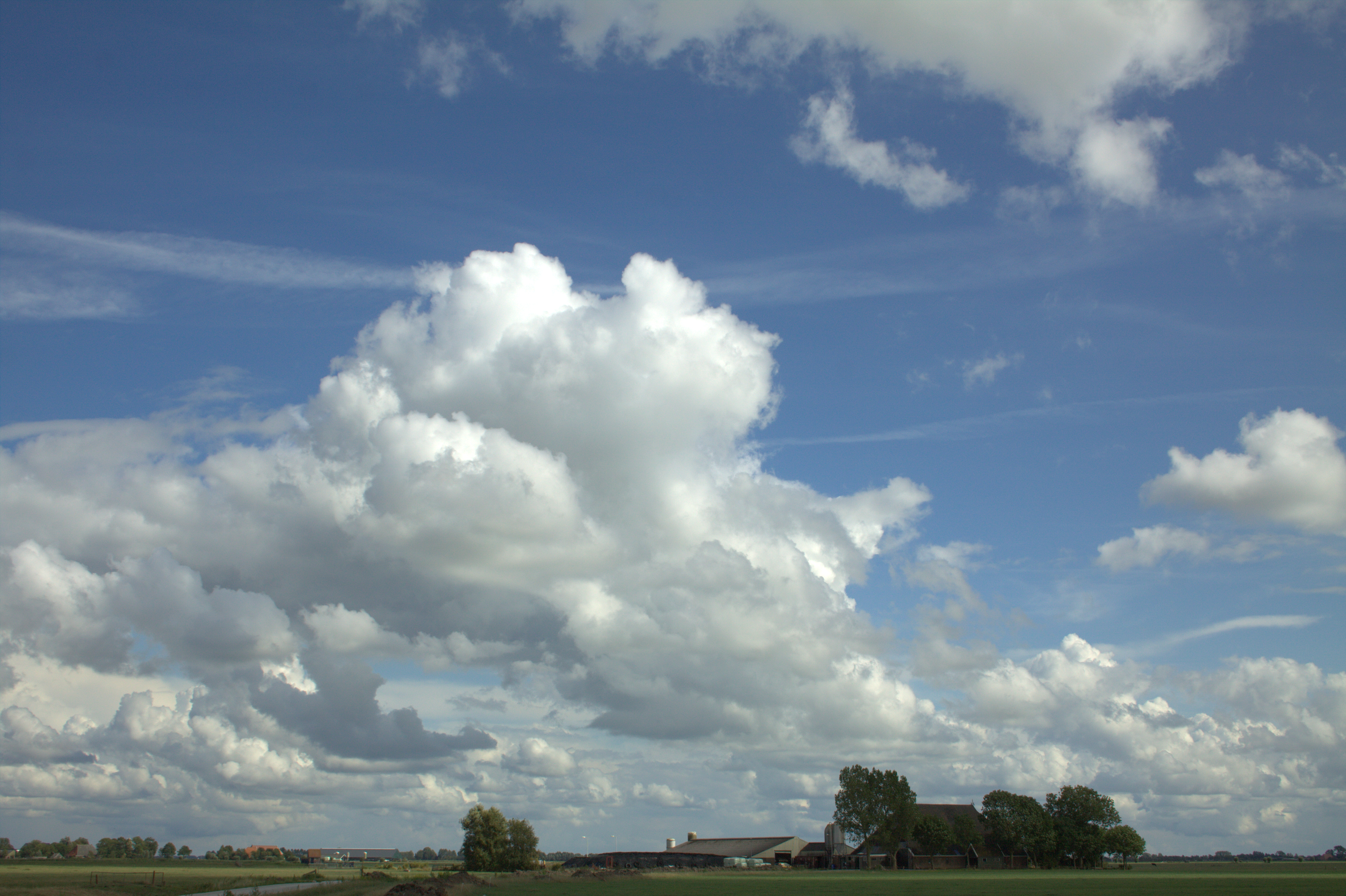 Tjaard. Een heel klein buurtschap even ten Zuiden van Wirdum en ook nu behorende bij de stad Leewarden.